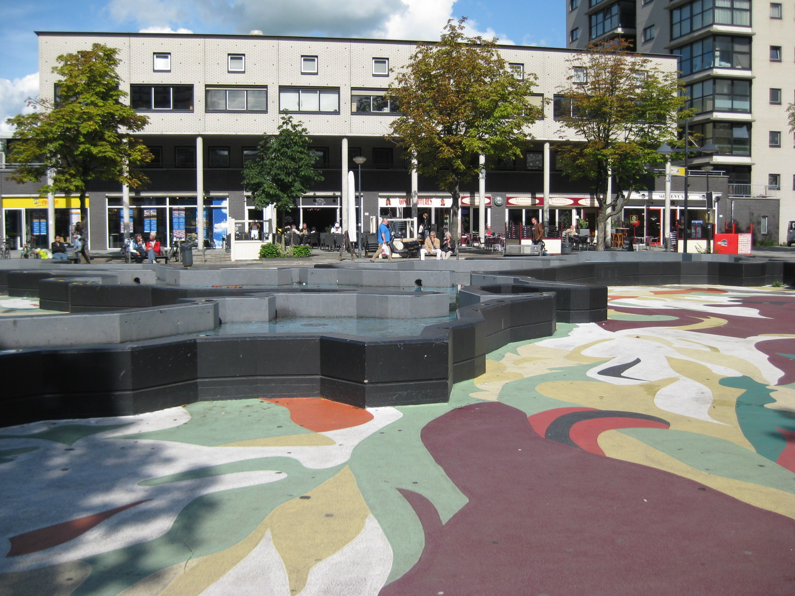 Kunstplein van Barbara Broekman, 1997 op het Buikslotermeerplein in Amsterdam-Noord